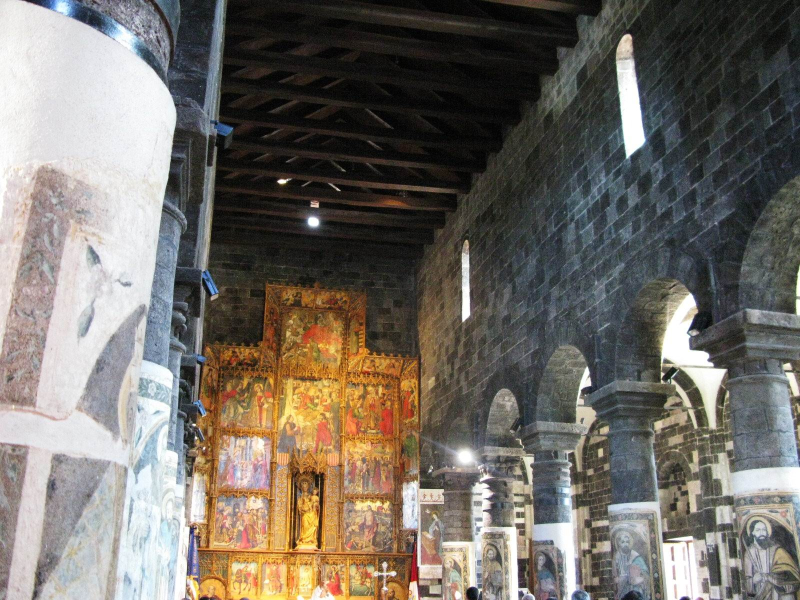 L'interno della abbazia di santa Maria del regno di Ardara, con l'imponente retablo posto dietro l'altare.